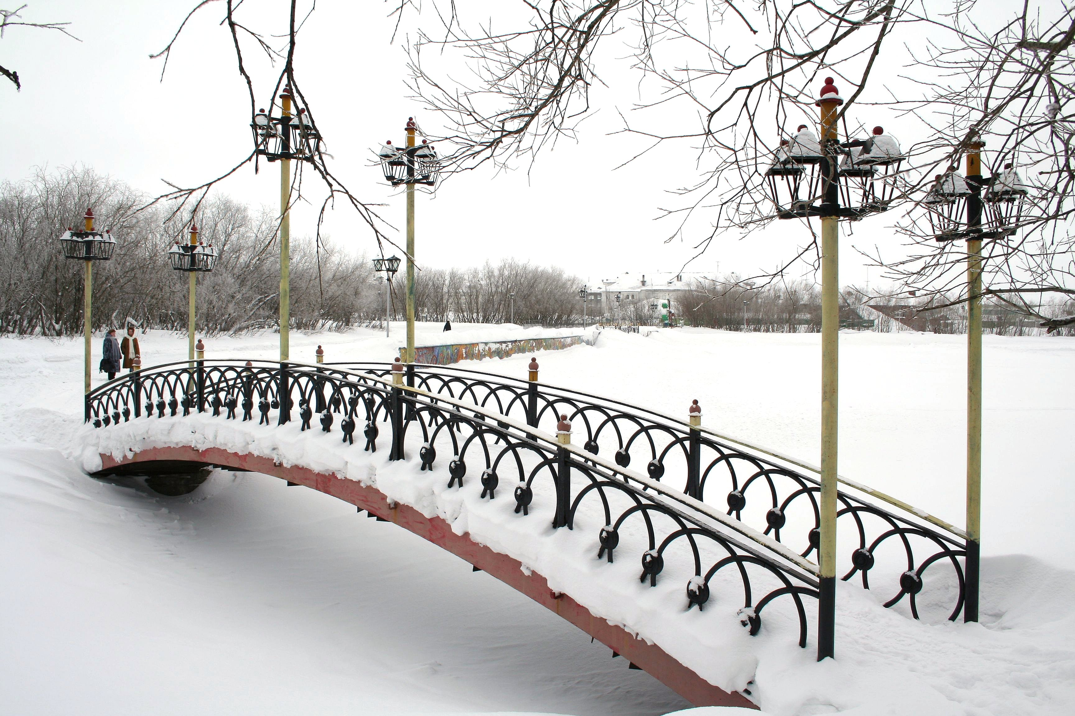 Beschreibung: Verschneiter See des Stadtparks in Workuta Autor: Nelson Correia Quelle: Bild selbst erstellt Erstellungsdatum: 14.03.2006